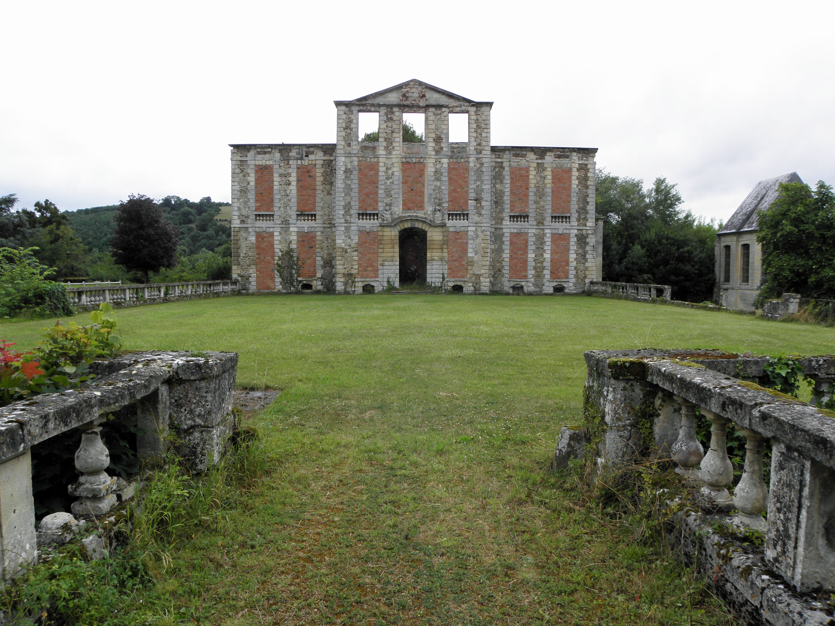 Le château d'Harcourt à Thury-Harcourt, département Calvados